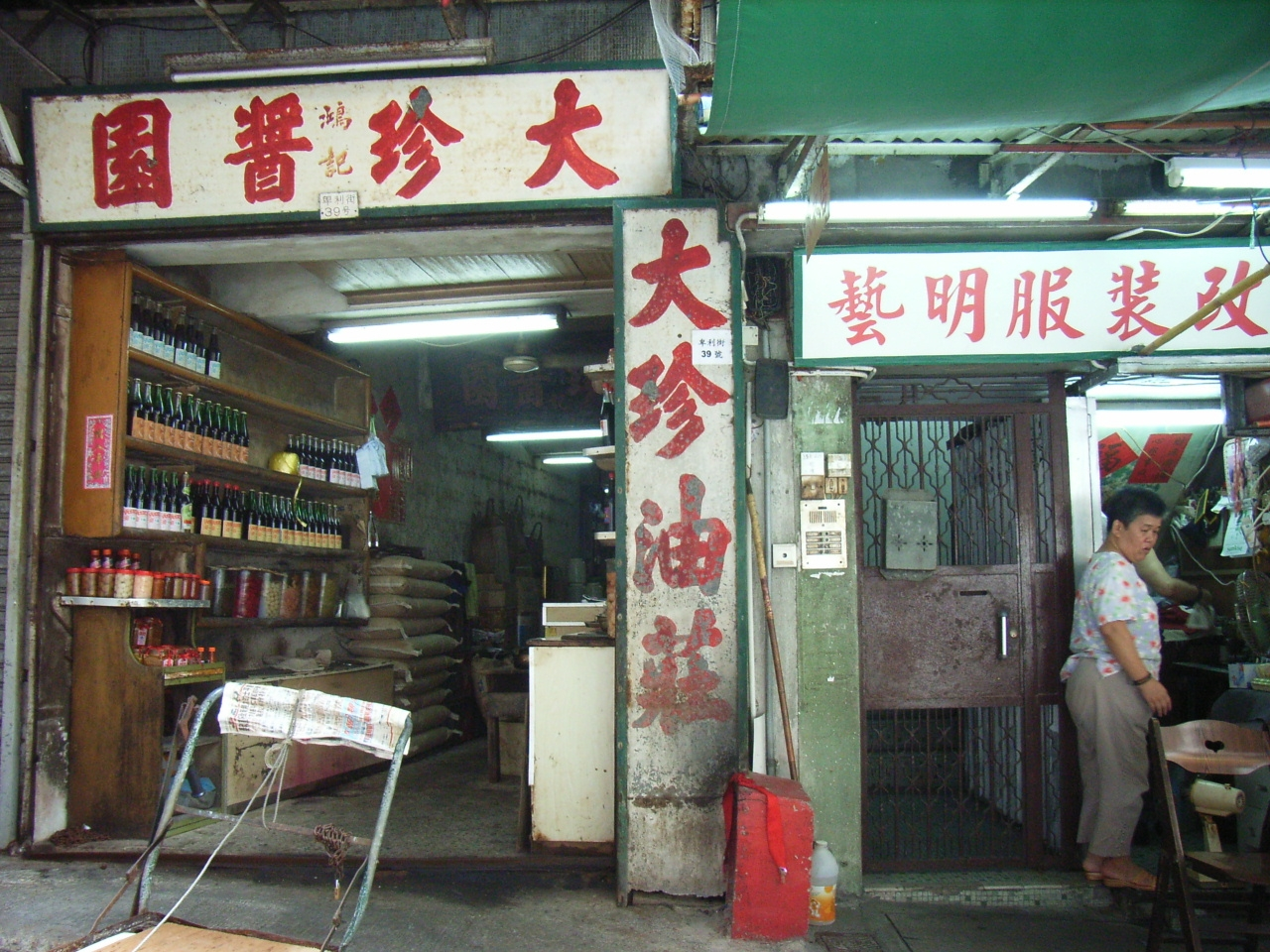 Peel Street (卑利街) is an old street in Central, Hong Kong By KennethTom